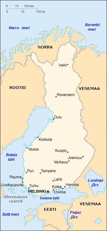 Soome kaart